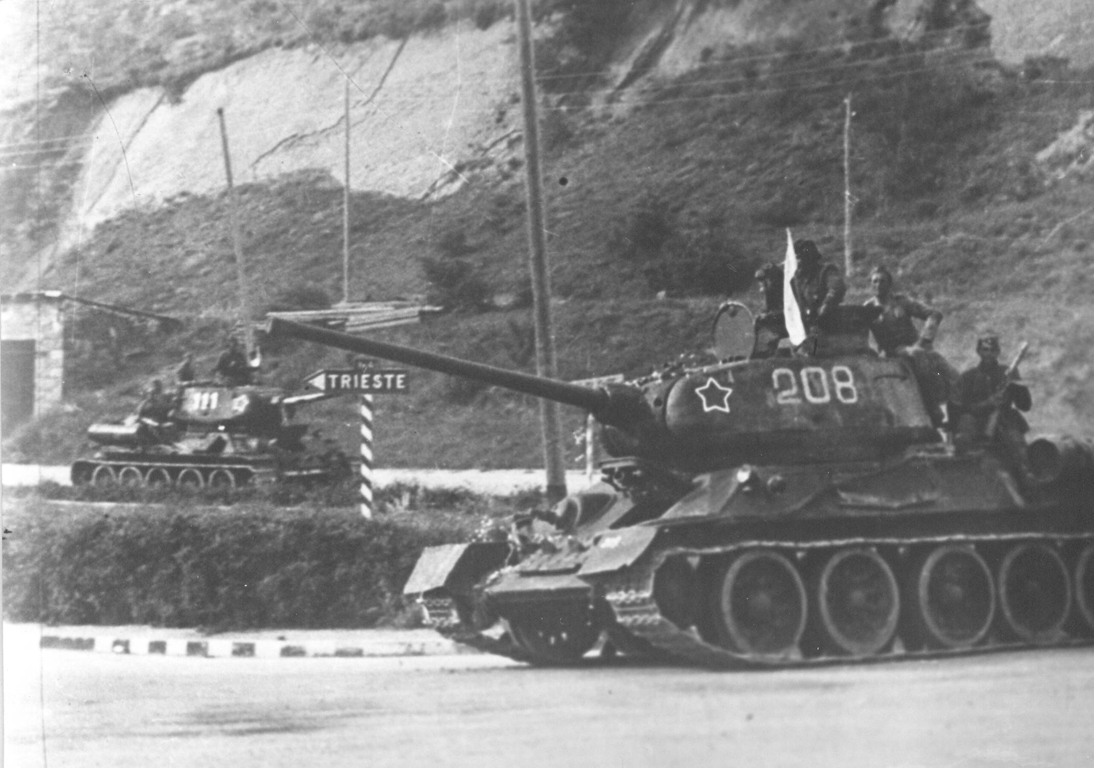 Tanka IV. armade prodirata v Trst